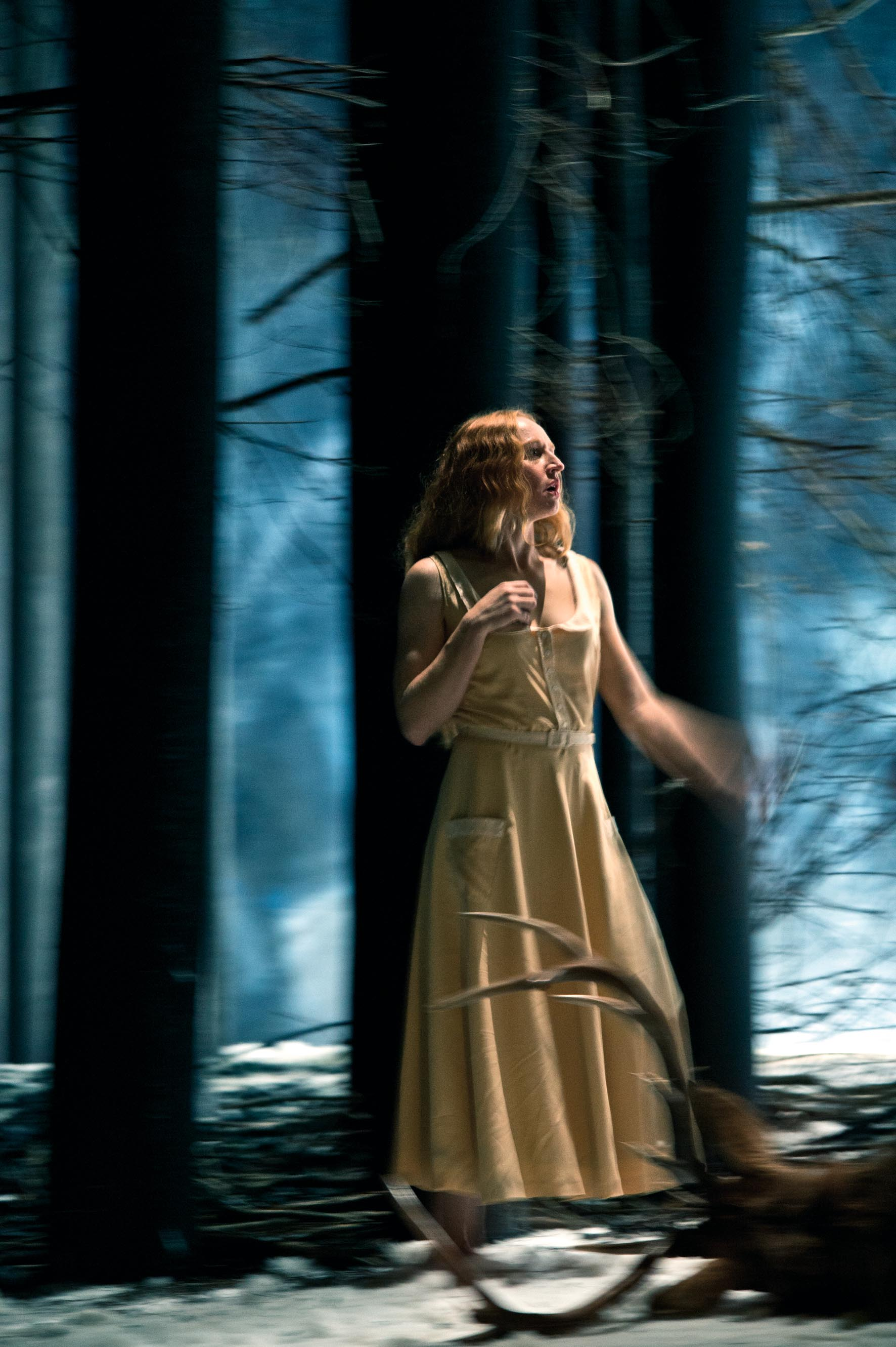 Salzburger Festspiele 2012: Brigitte Hobmeier in Händl Klaus' Meine Bienen. Eine Schneise